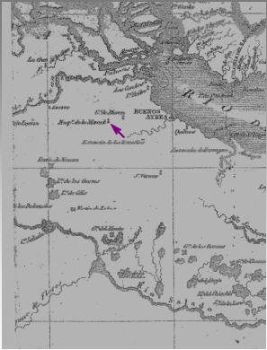 Mapa de 1826 en donde de ubica al pueblo de Merlo como Nuestra Señora de la Merced.